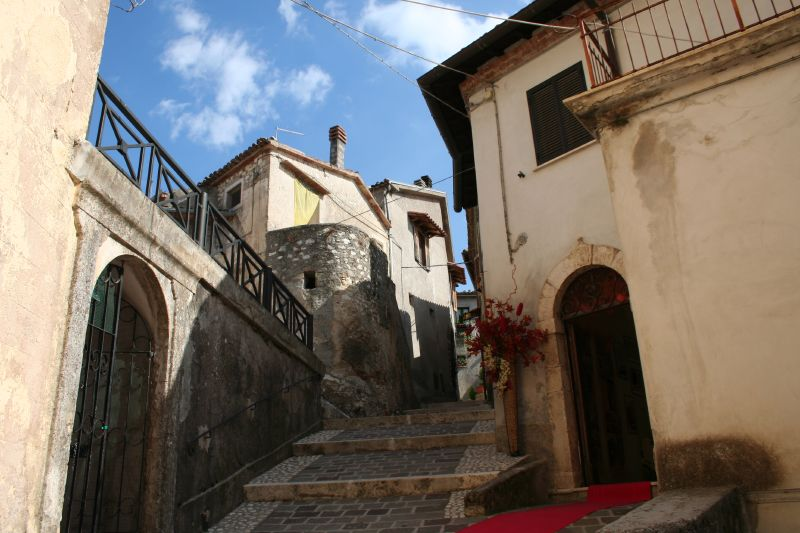 Il borgo di Morro Reatino (provincia di Rieti, Lazio)